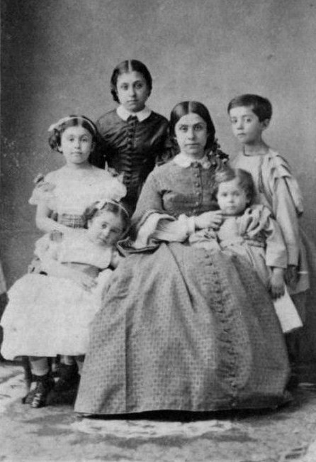 Княгиня Софья Андреевна Гагарина, ур. Дашкова (1822—1908) с детьми: Екатериной (1845—1920; в замужестве Муханова), Марией (1851—1941; в зам. за М. Н. Раевским), Анастасией (1853—1876; жена графа П. М. Орлова-Денисова); Григорием (1850—1918) и Андреем (1856—1920).